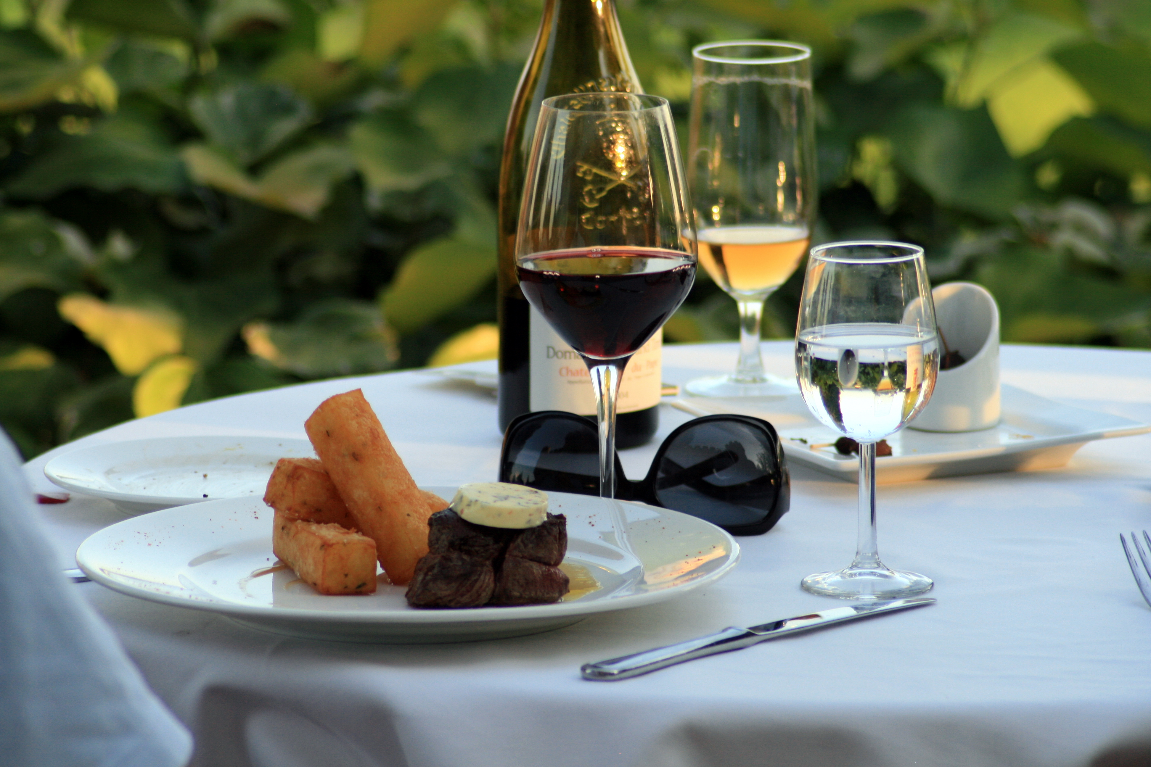 AOC châteauneuf-du-pape rouge